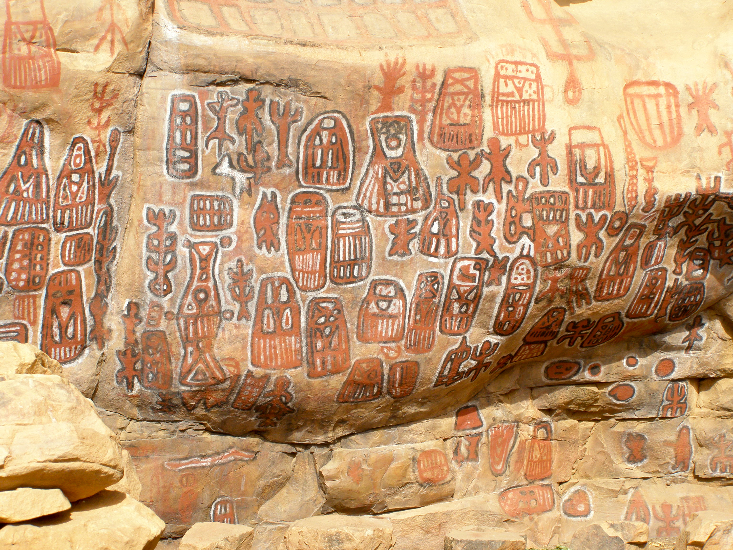 Peintures rupestres de la "grotte de la circoncision" - Village de Songho - Bandiagara - Mali